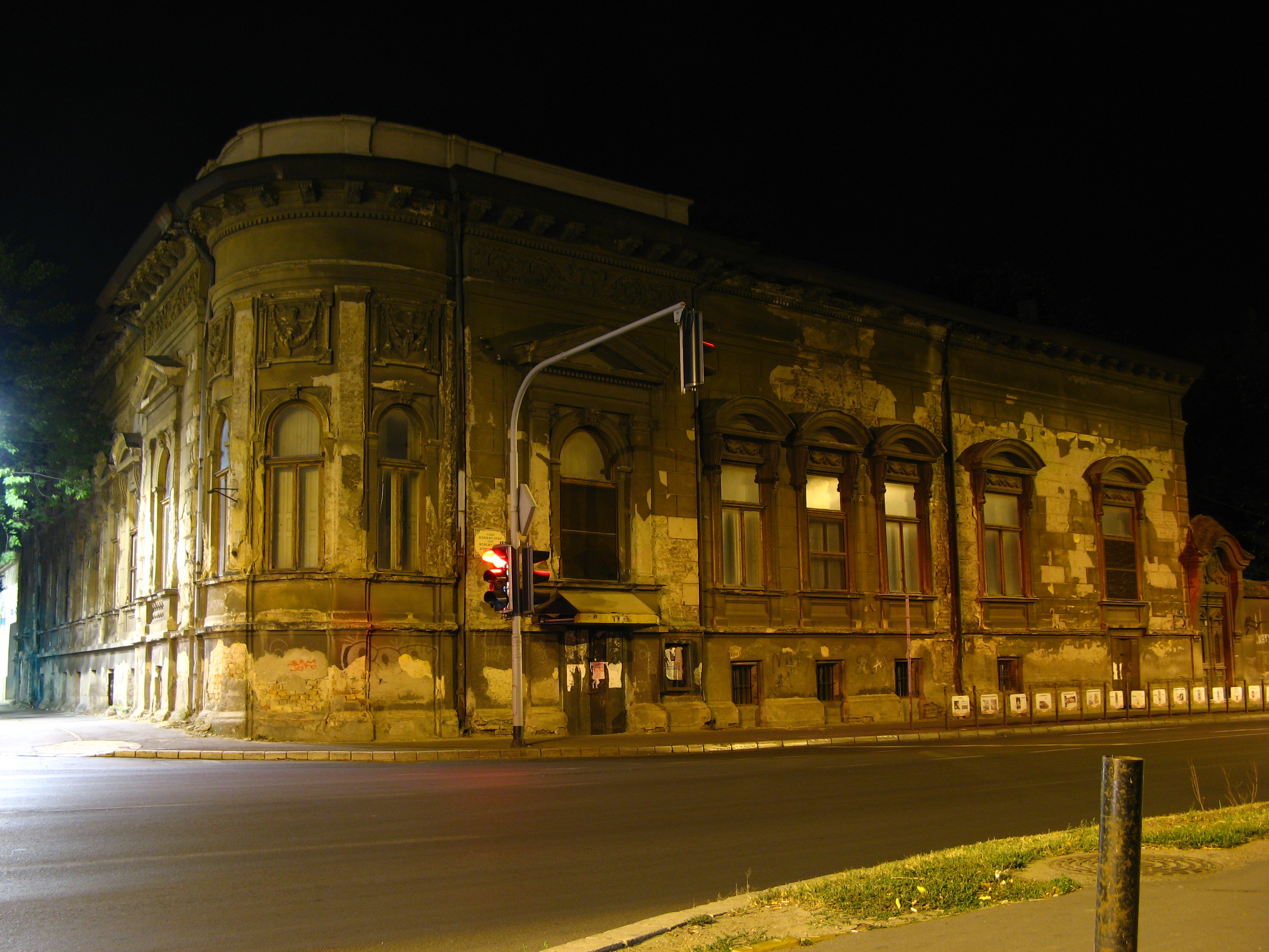 Кућа изузетно раскошног стила саграђена је 1882. године за Вилмоша Таусига. Године 1907. дограђена је према пројектима Деже Јакаба и Марцела Комора.